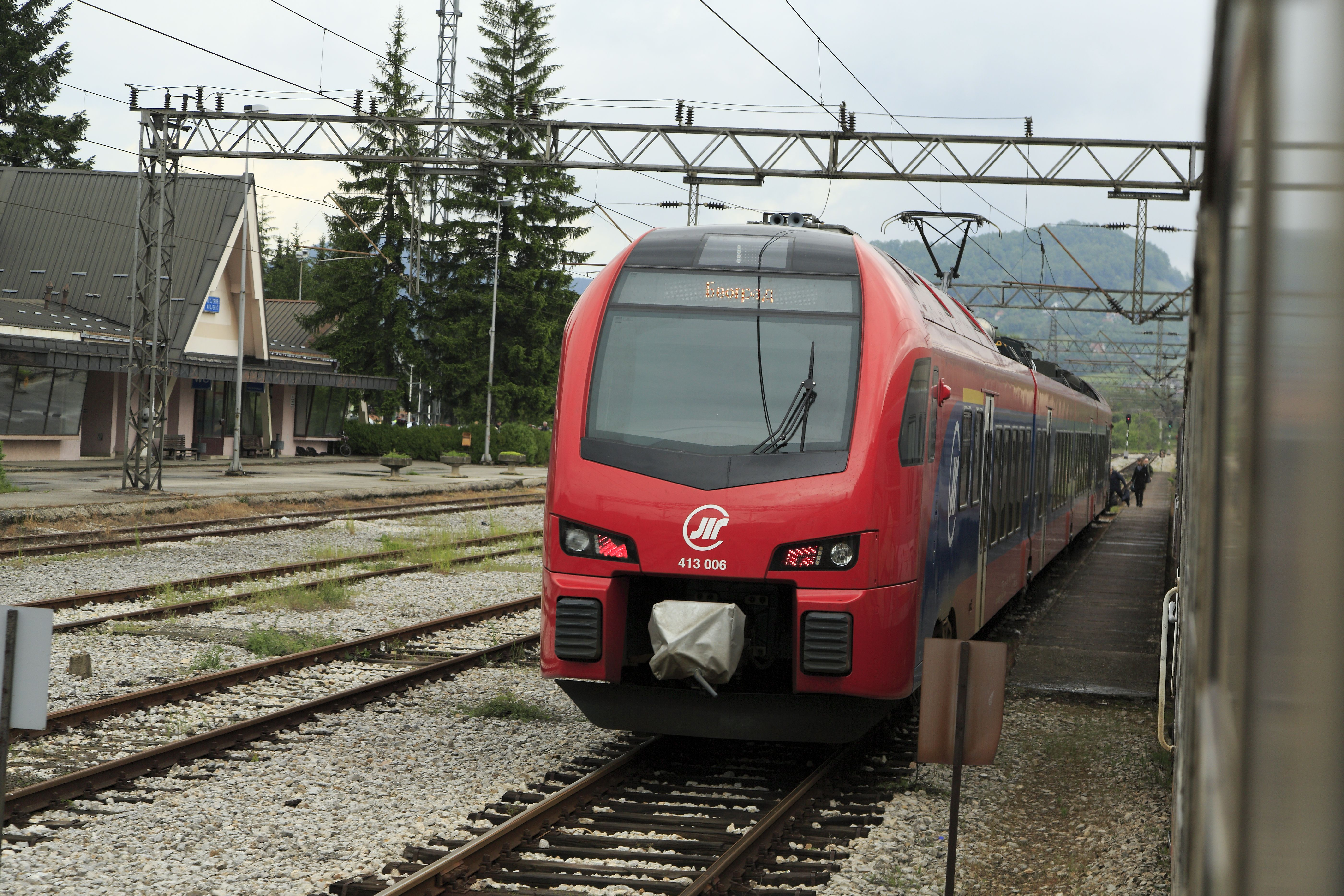 Personenzug Richtung Beograd, Nachschuss. Auch diese Einheit ist auffallend sauber und unbesprüht.